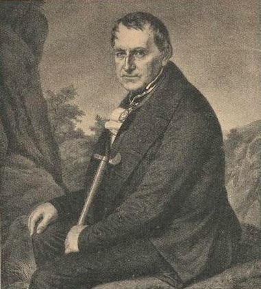 Leopold von Buch , Lithographie von C. Fischer nach einem Gemälde von Carl Joseph Begas, 1850